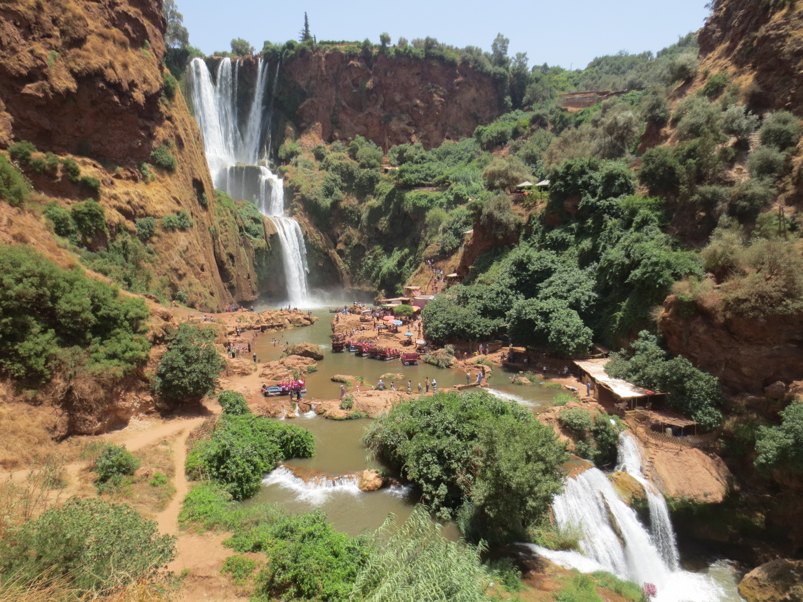 Ouzoud Falls